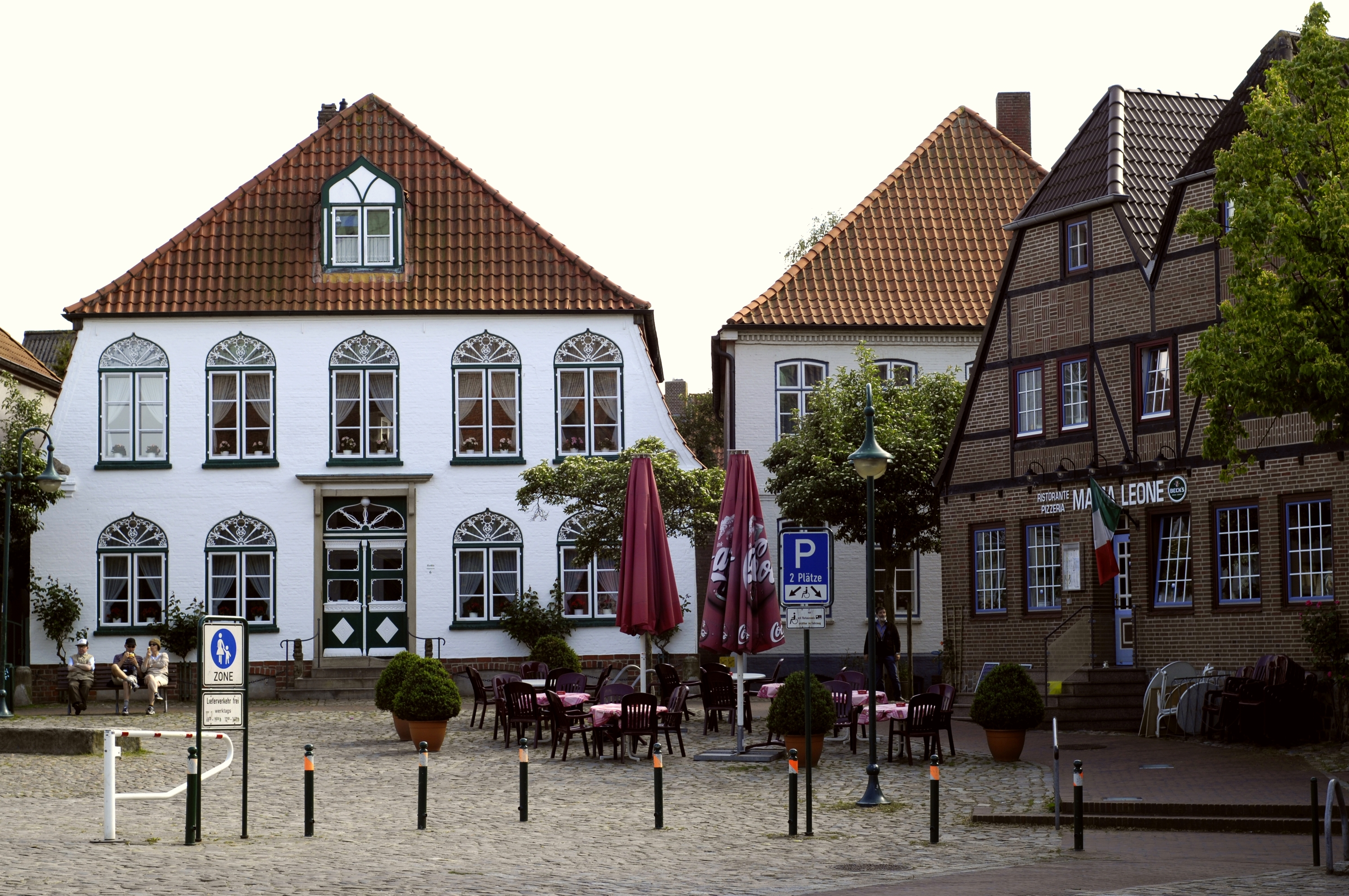 Meldorf, Cafes am Markt